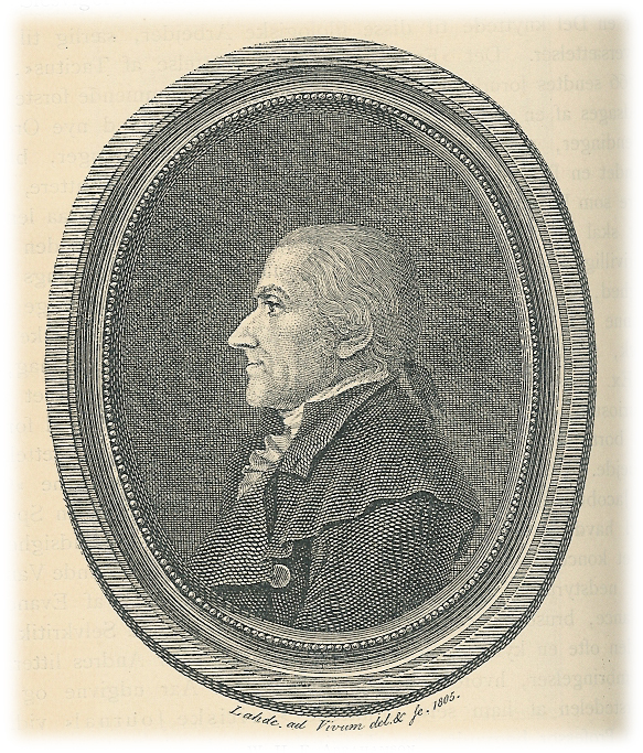 W.H.F. Abrahamson